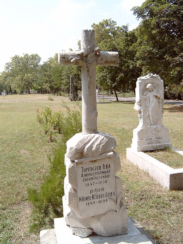 Toperczer Ilka (Kühnel) (Pest-Belváros, 1847. július 11. – Budapest-Józsefváros, 1876. szeptember 24.) énekesnő (szoprán) sírja Budapesten. Kerepesi temető: 28-1-101.